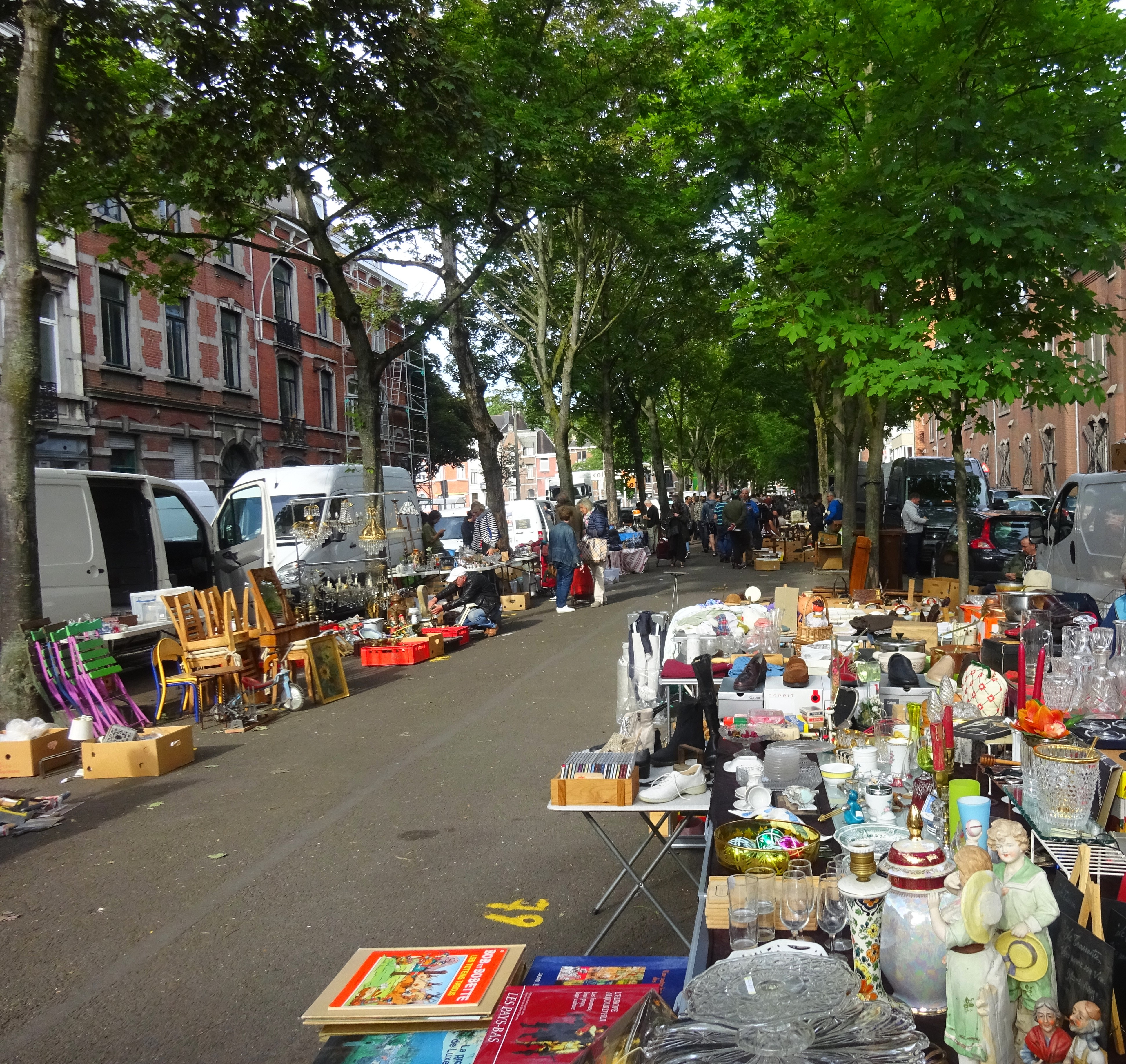 Brocante St Pholien, Outremeuse, Liège (les vendredis matin)